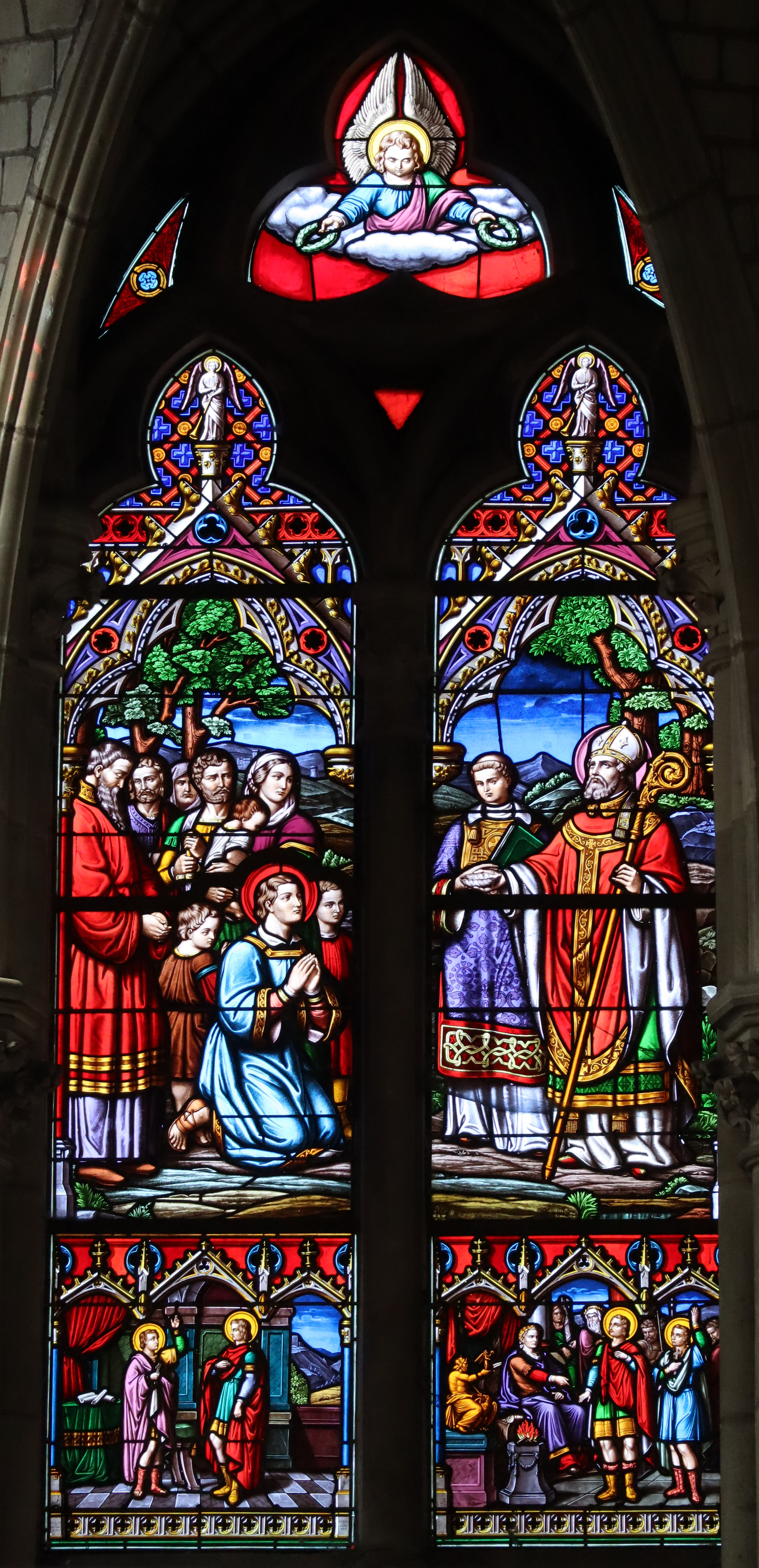 Église Saint-Similien de Nantes (44). Vitraux du chœur. Chapelle gauche. Baie 101. 1er registre : Saint-Donatien confortant Saint-Rogatien dans sa foi / Condamnation des Saints Donatien et Rogatien. 2d registre : Baptême de Saint-Donatien par Saint-Similien.